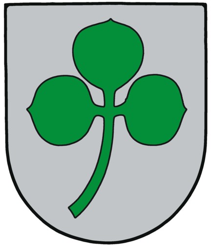 Ortswappen von Kasdorf Quelle: Ortsgemeinde Kasdorf Datum: 08.02.2007 Autor: Ortsgemeinde Kasdorf